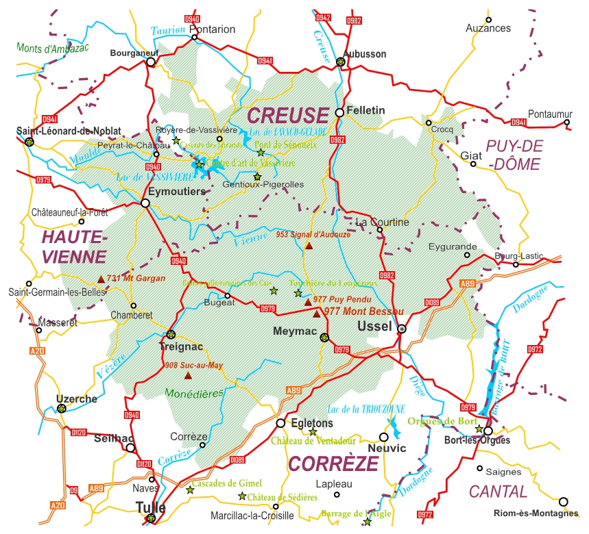 Carte du plateau de Millevaches (Limousin, France)